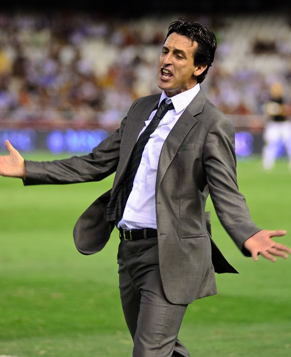 L'entrenador merengot Unai Emery